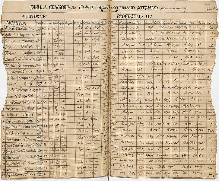 Schulzeugnis von August Hermann Francke 1677